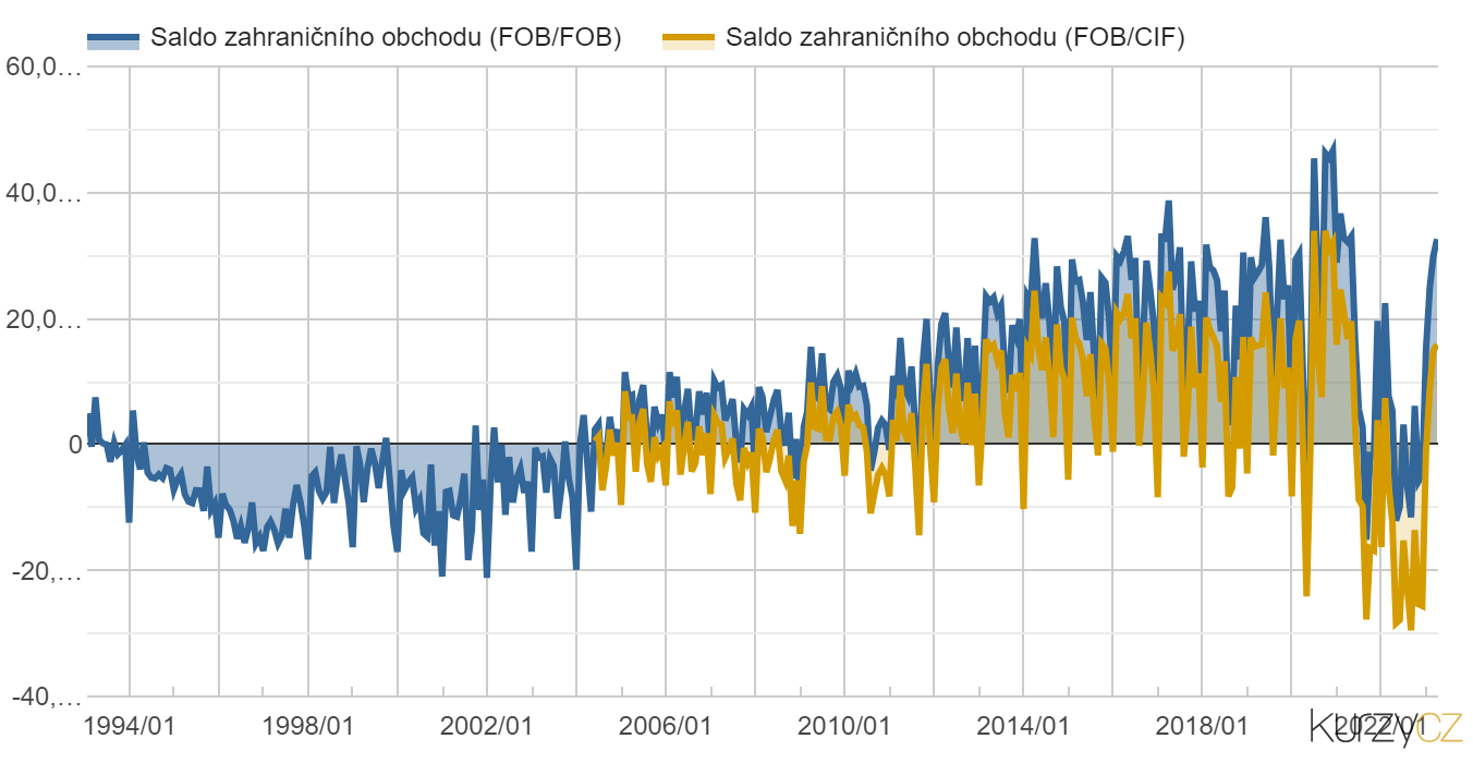 STATISTIKA PLATEBNÍ BILANCE